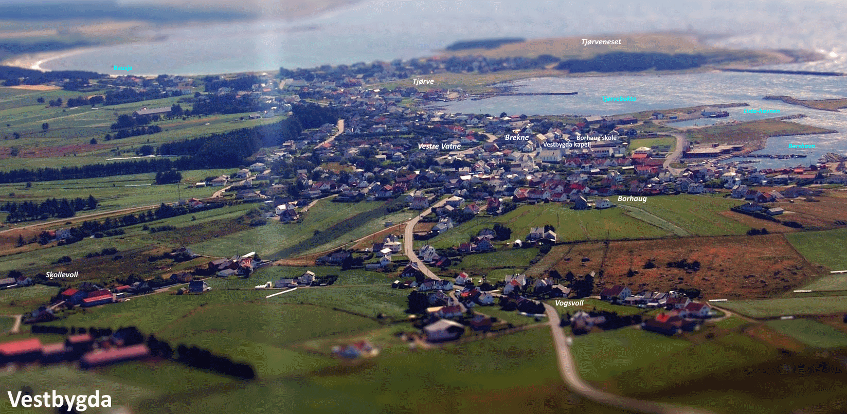 Flyfoto av tettstedet Vestbygda. Med navn på områder. Effekt: Tilt-shift